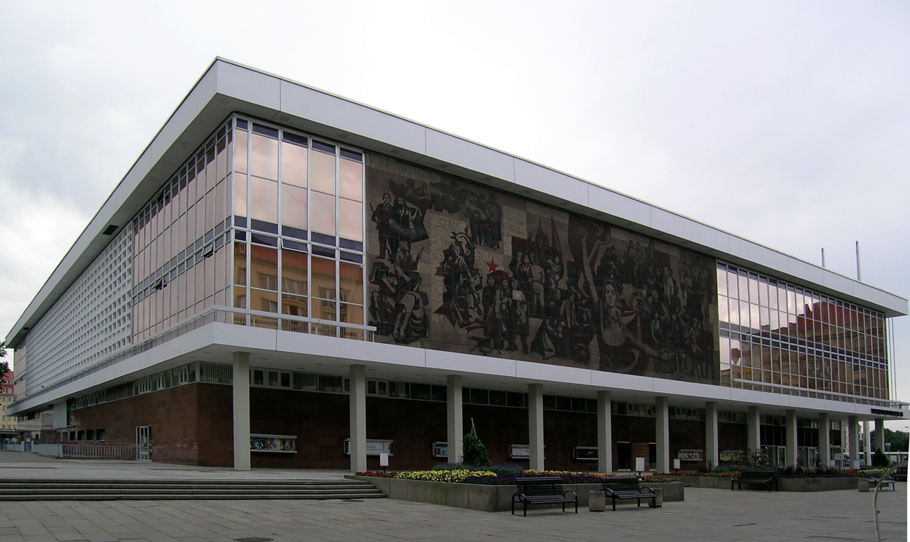 Kulturpalast, Dresden. As seen from Schloßstrasse.